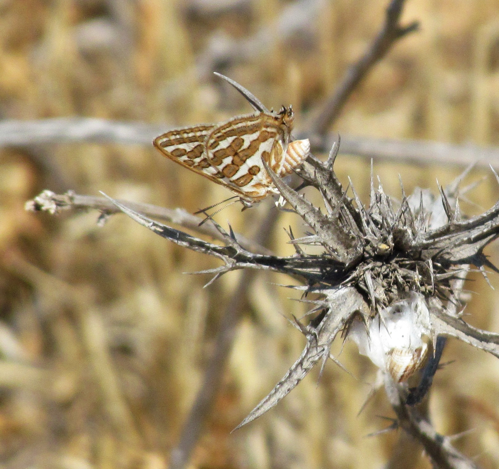 כחליל מנומר(Apharitis acamas), צולם בגבעת מר אליאס, ליד המנזר ב-29.6.2013